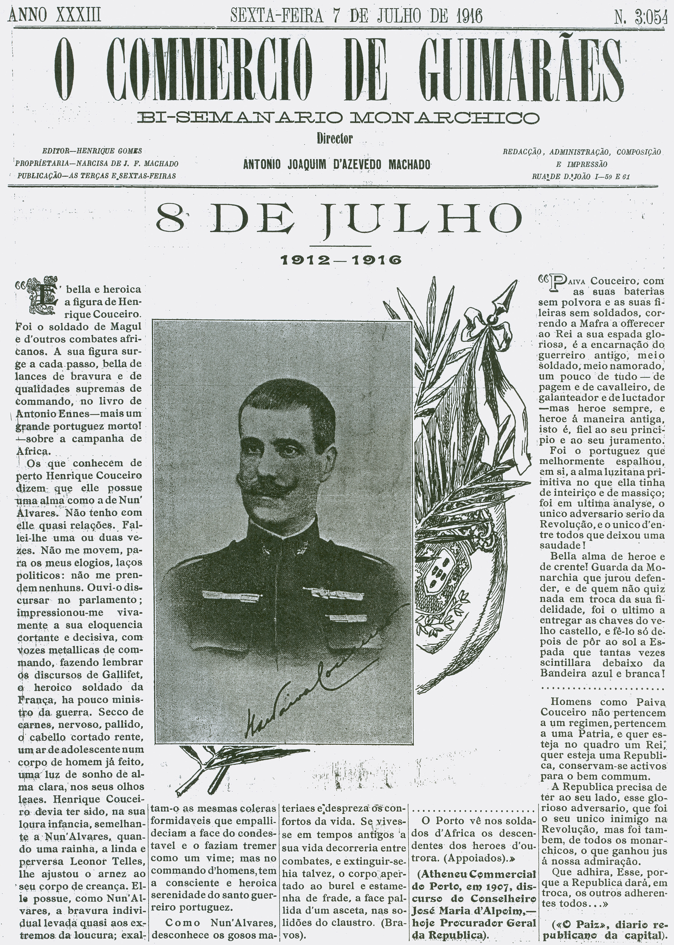 O Commercio de Guimarães